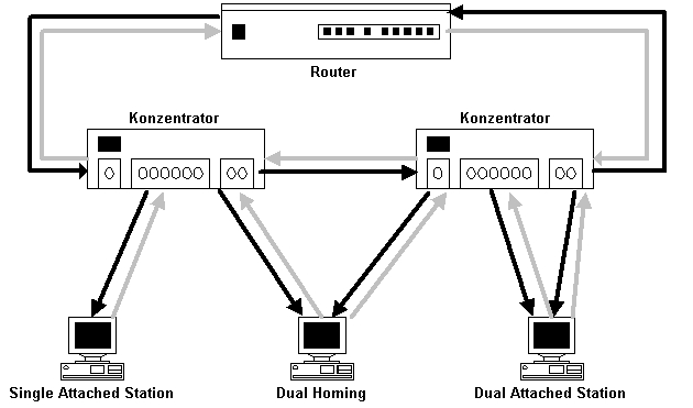 Erstellt von Martin Dürrschnabel FDDI Anschlußarten, "Single Attached Station", "Dual Homing" und "Dual Attached Station".